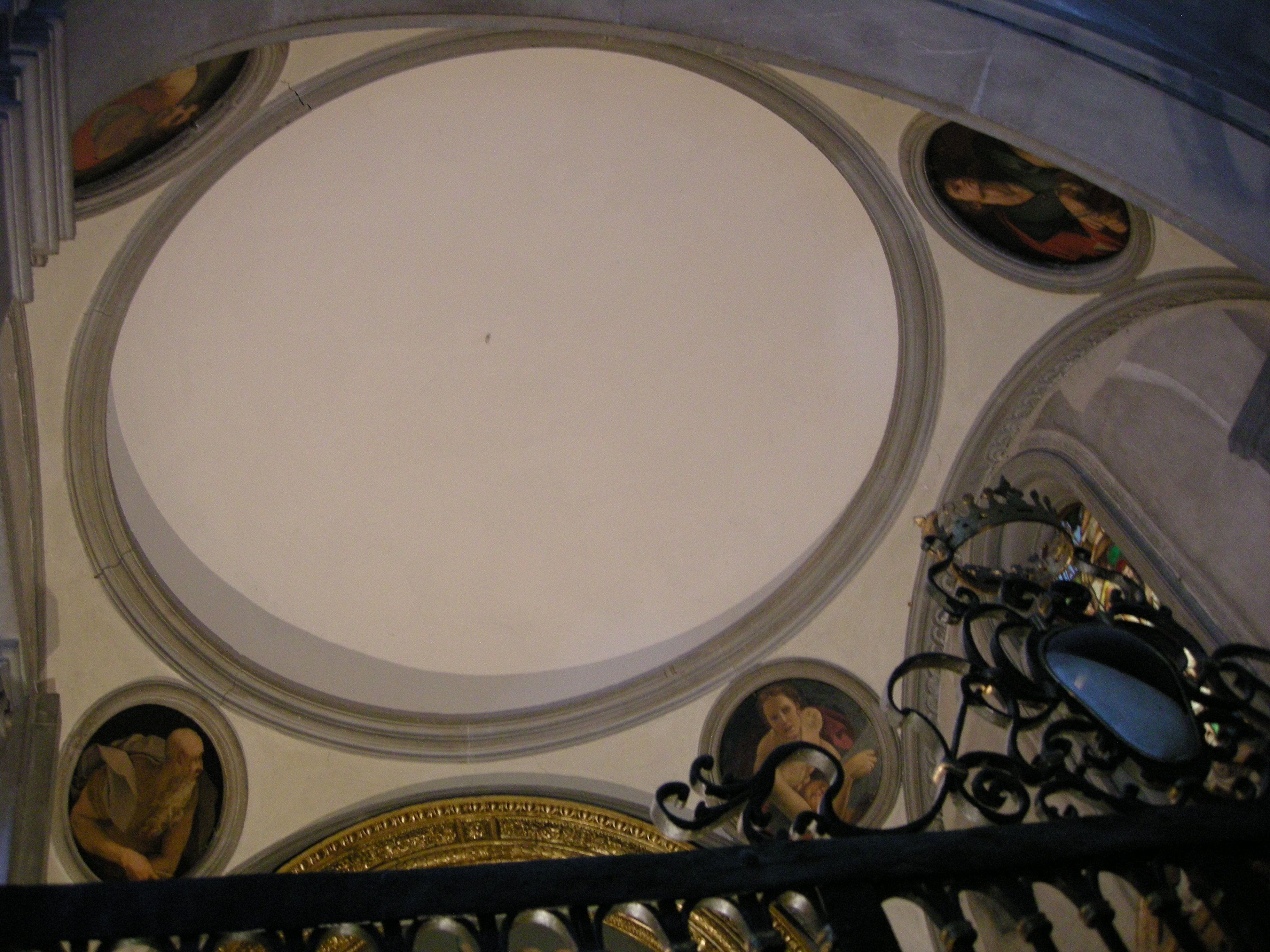 Santa felicita, cappella capponi 07 cupola